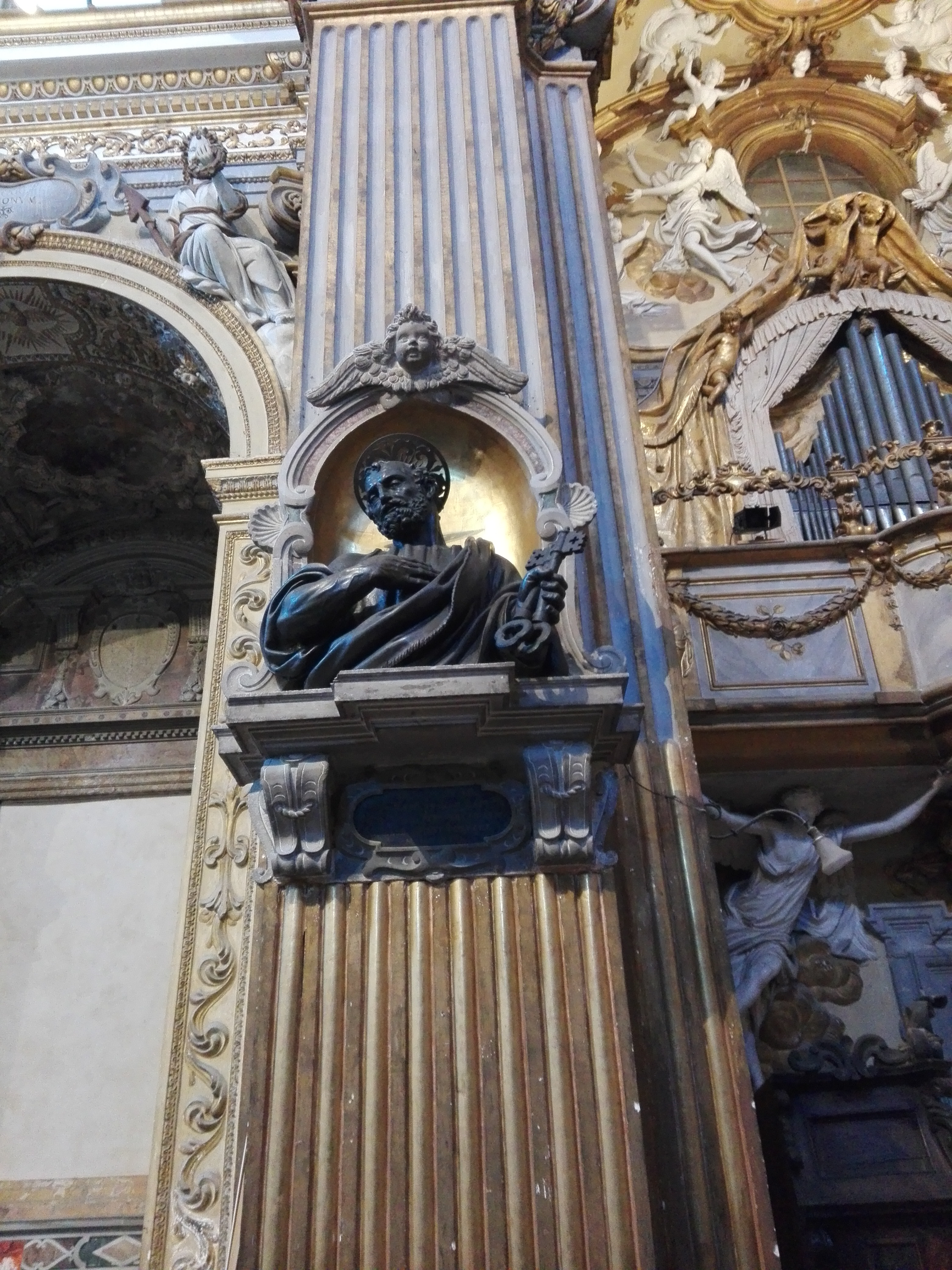 Chiesa